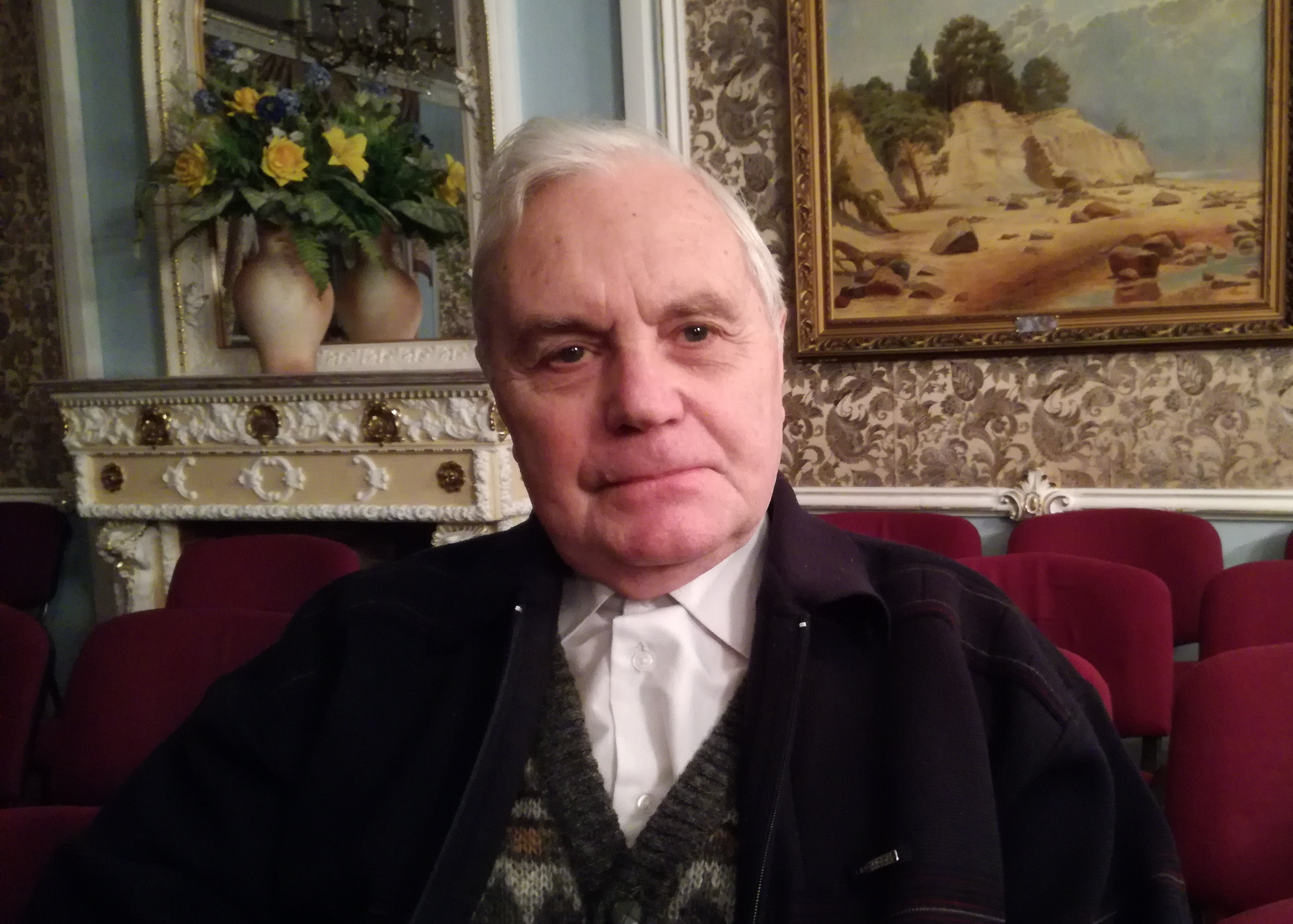 Виктор Николаевич Латышев